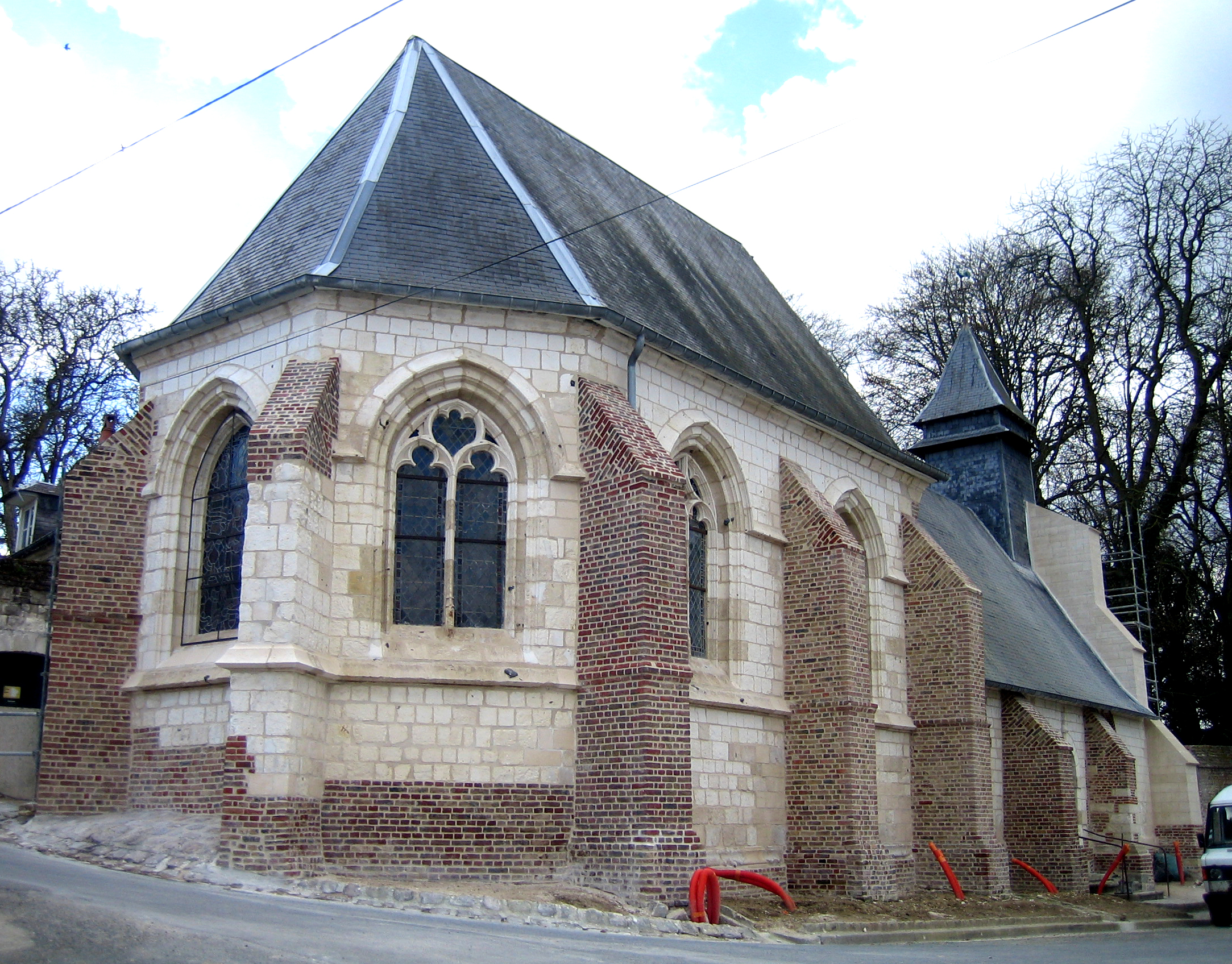 Saveuse (Somme, France) Le chevet de l'église, vu lors de la fin des travaux de restauration.